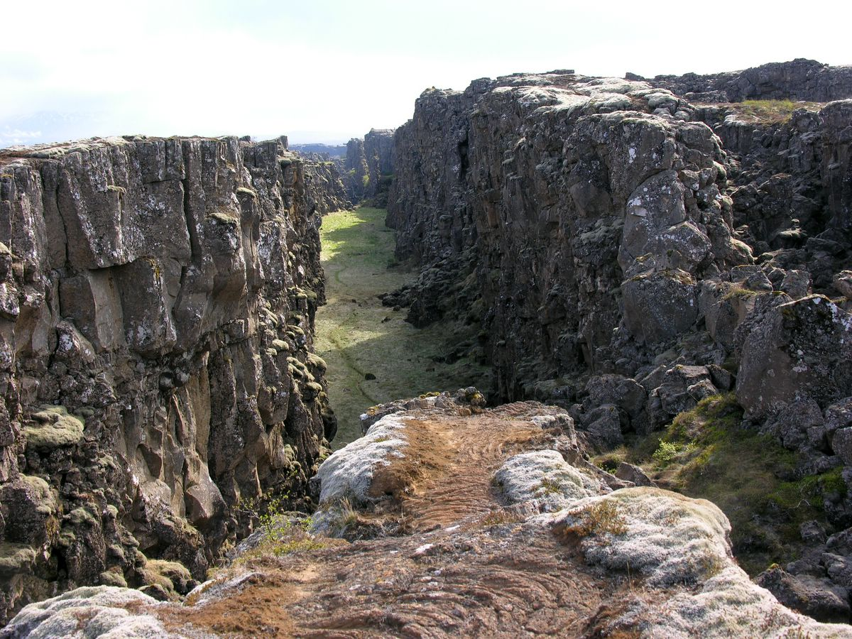 Þingvellir, Iceland